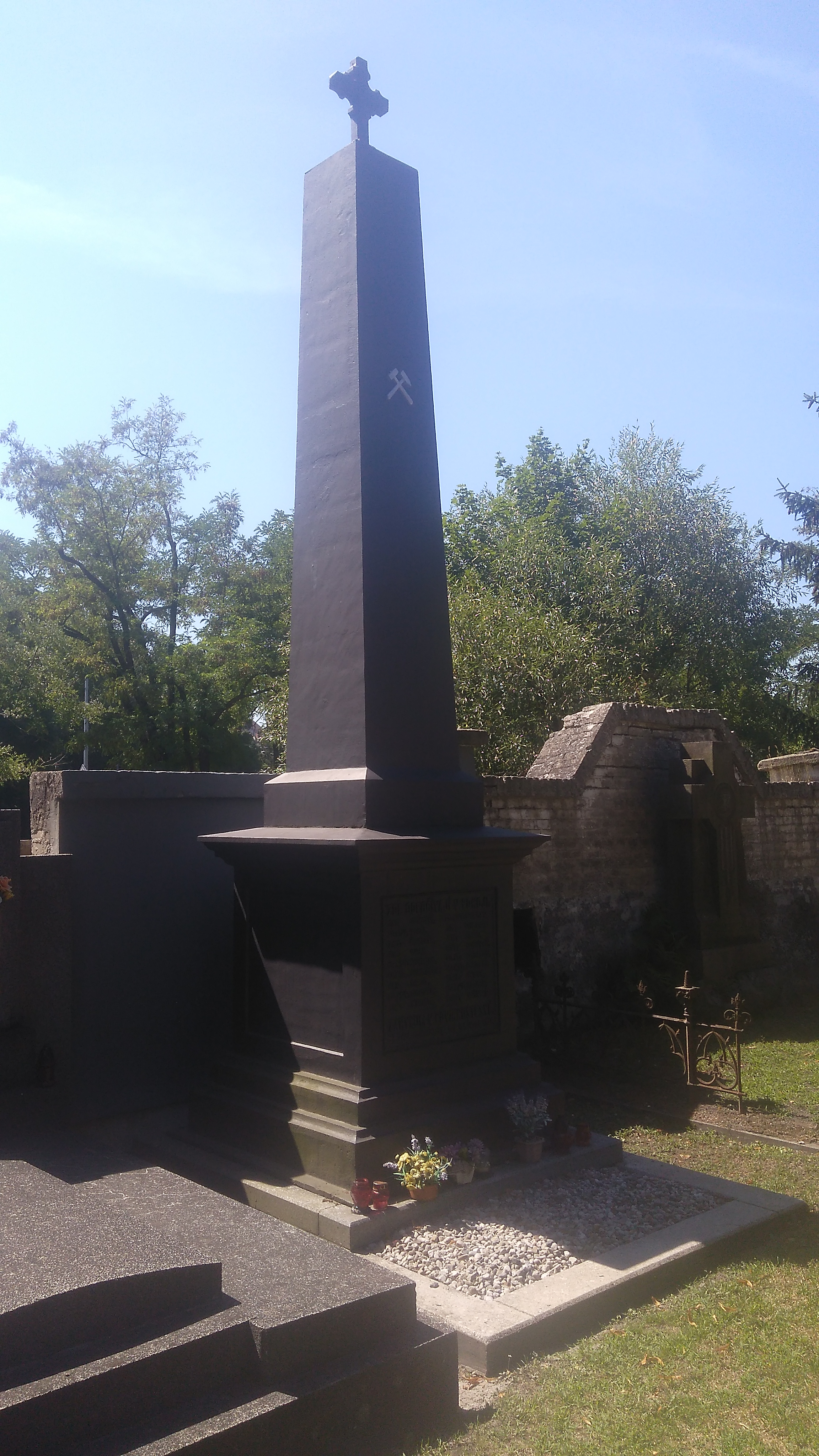 mohyla horníků